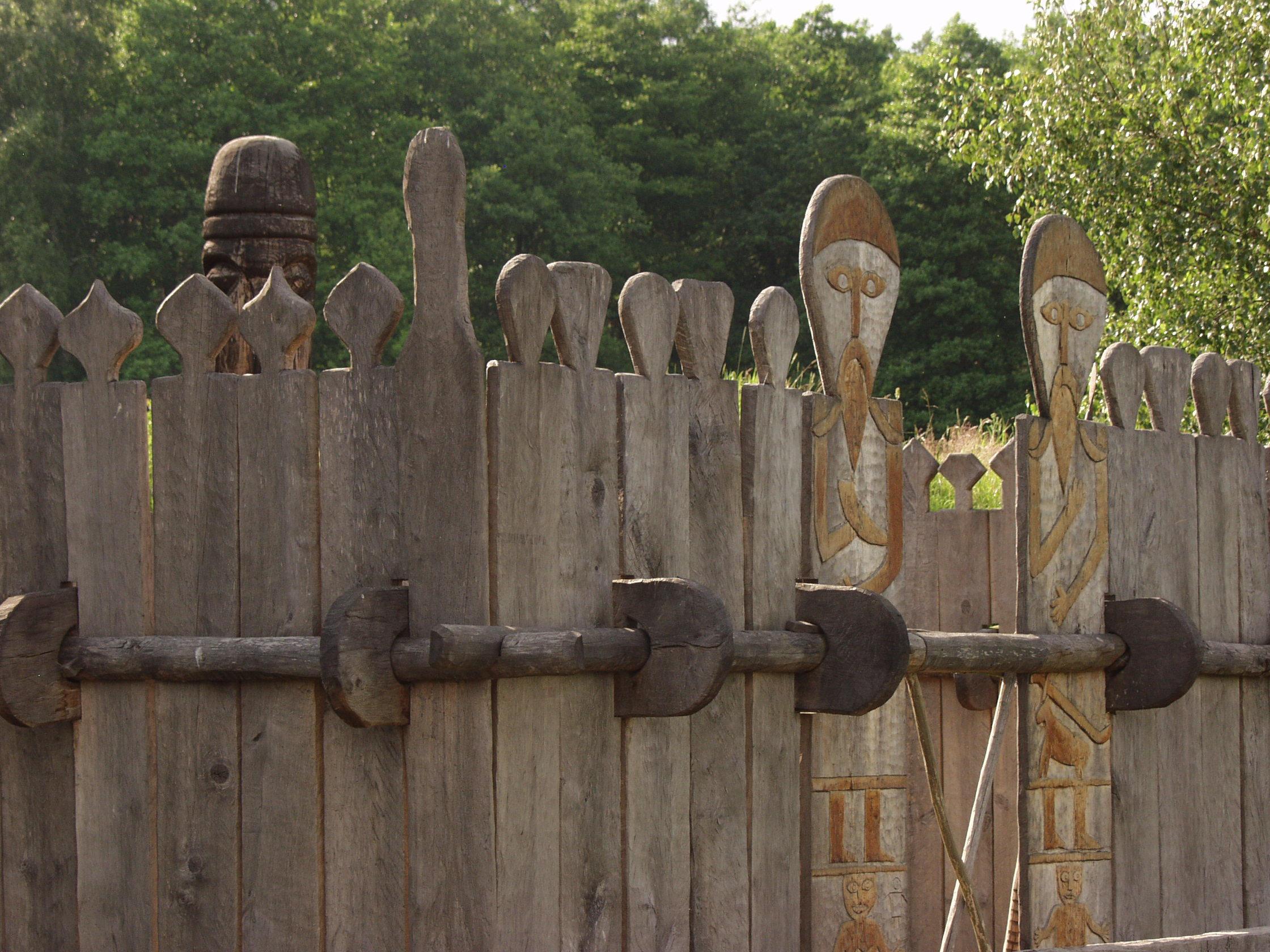 Ukranenland, Tempel der slawischen Götter